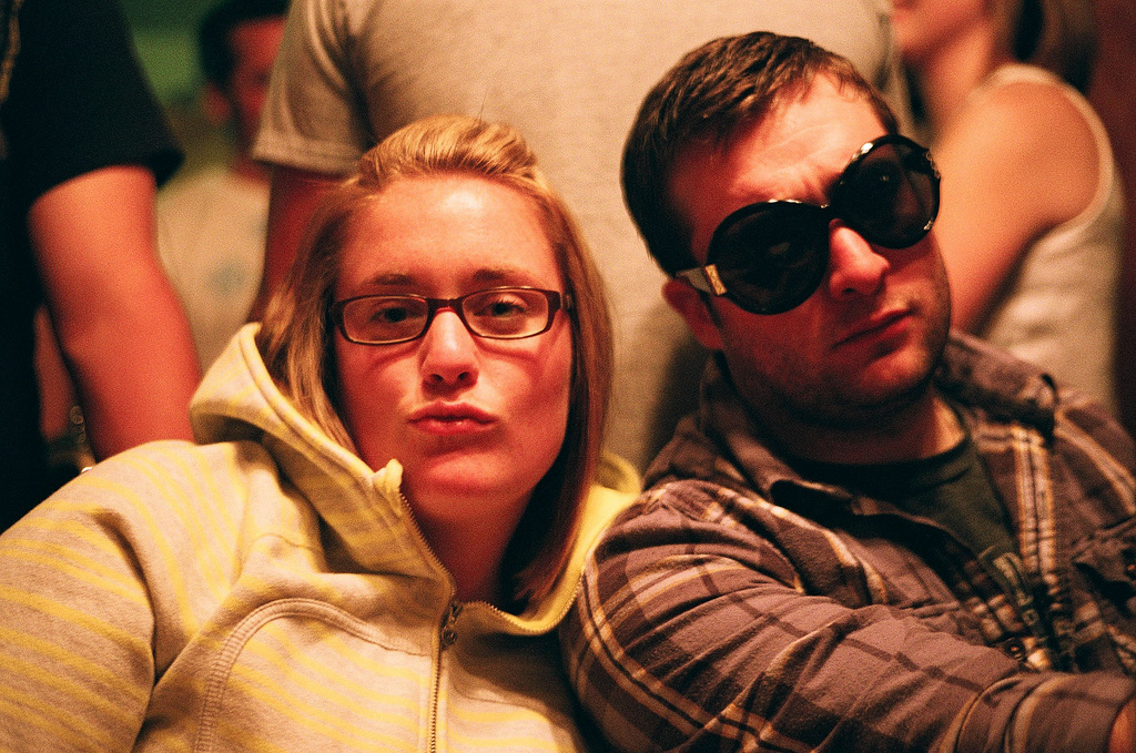 Duckface